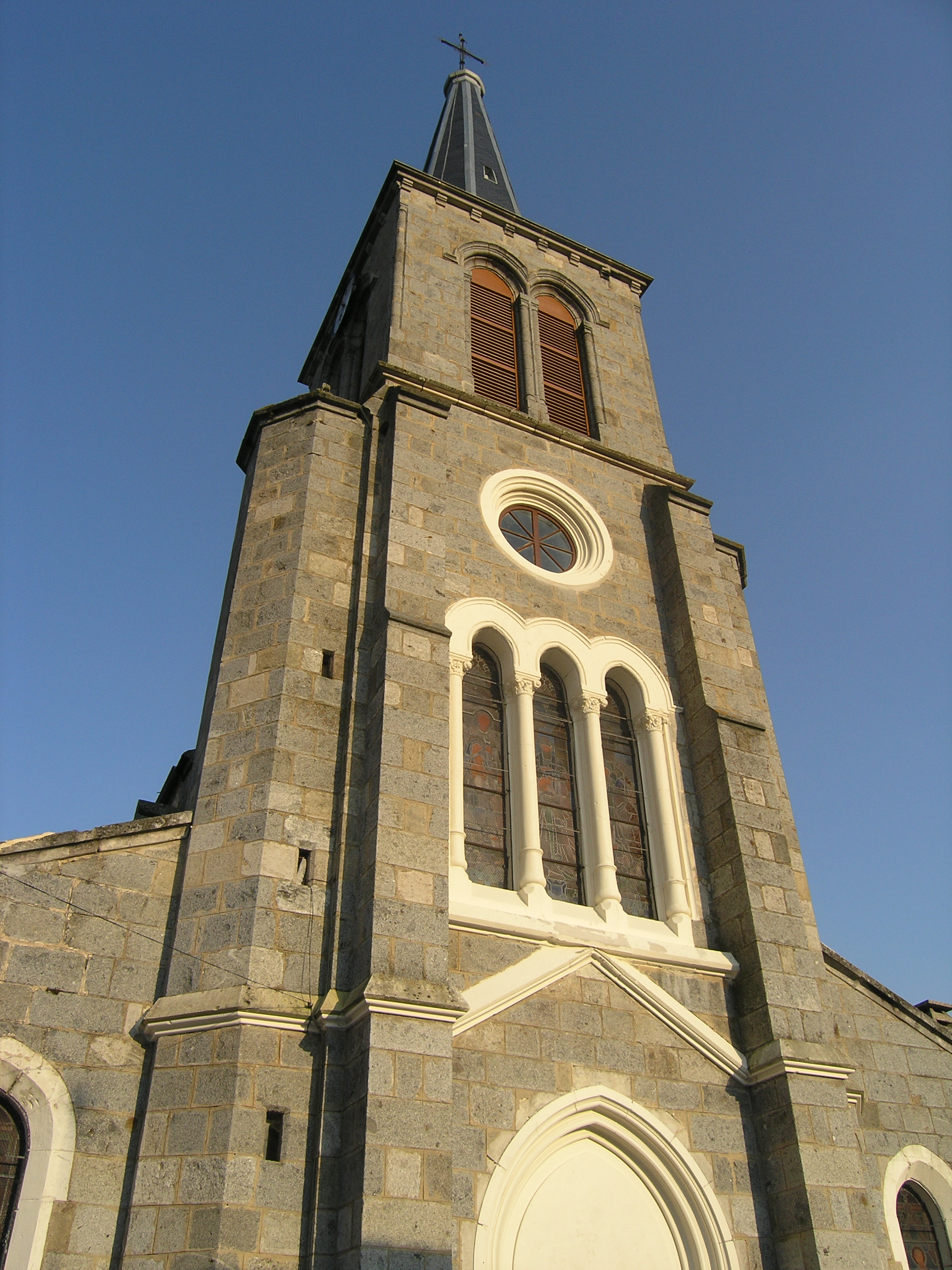 clocher sauvessanges